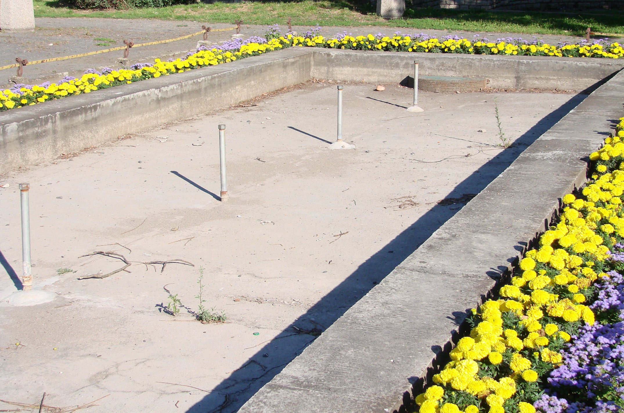 Fontanna czy zbiornik przeciwpowodzowy? Opole.